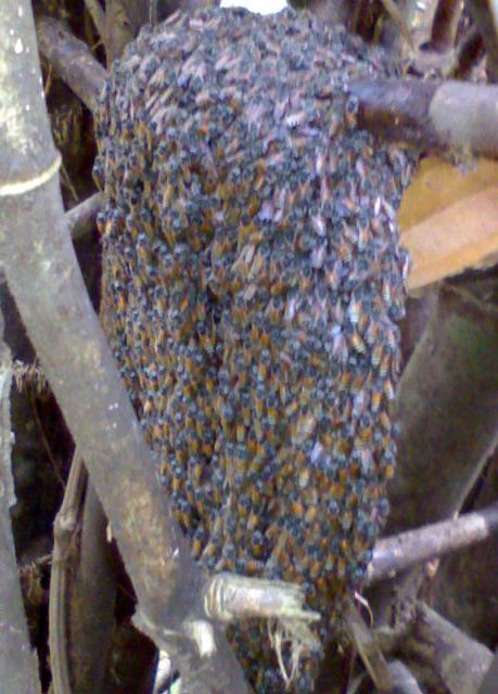 കോൽതേനീച്ച. വ്യത്യസ്തമായ ഒരിനം തേനീച്ച. ഒരു അട മാത്രമുള്ള ഇവയെ ഇണക്കി വളർത്താൻ കഴിയില്ല